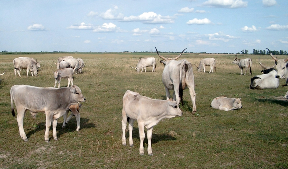 Ungaresch Groranner an der Puszta.